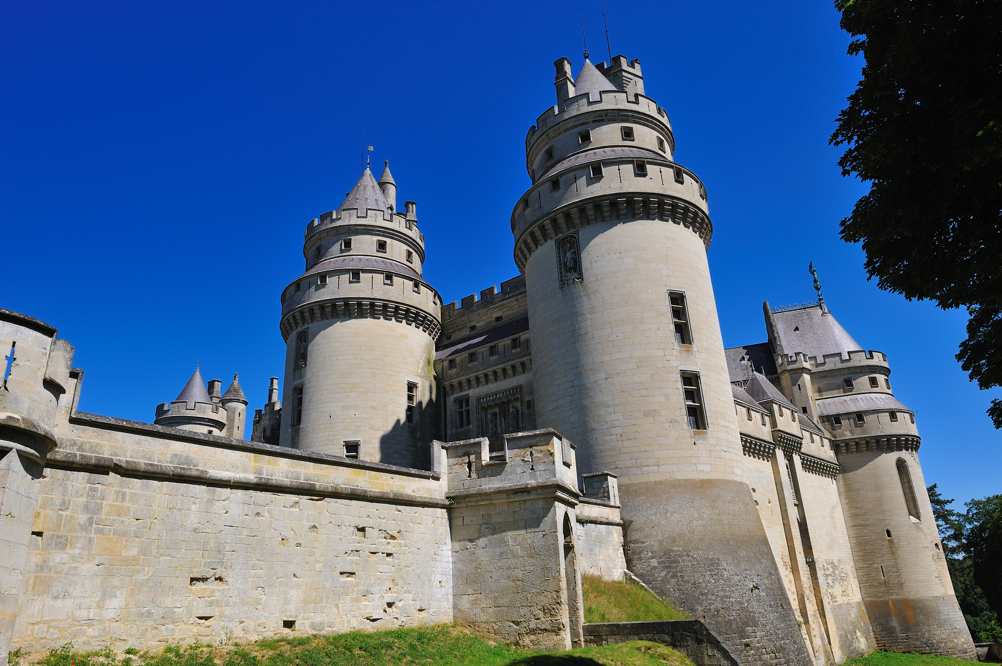 Vue generale du chateau de Pierrefonds